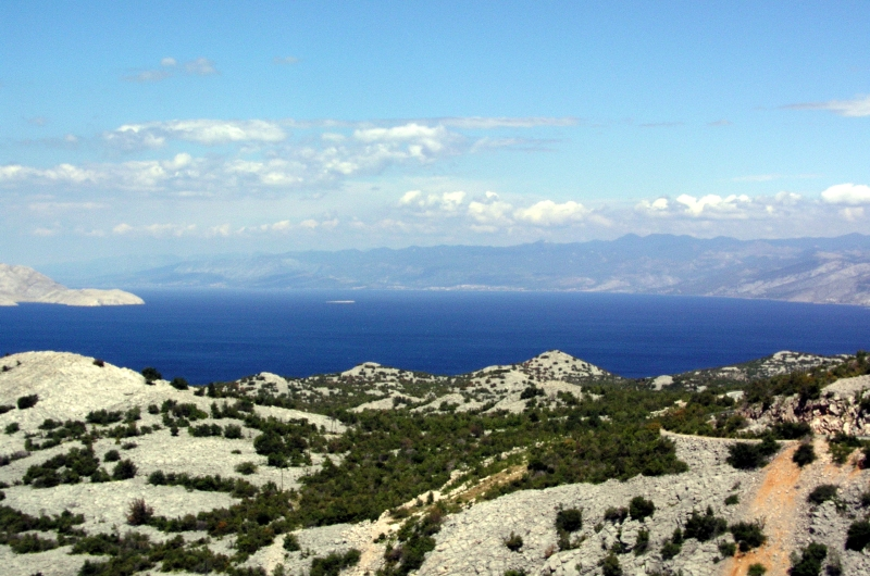 Velebitski kanal, Croatia